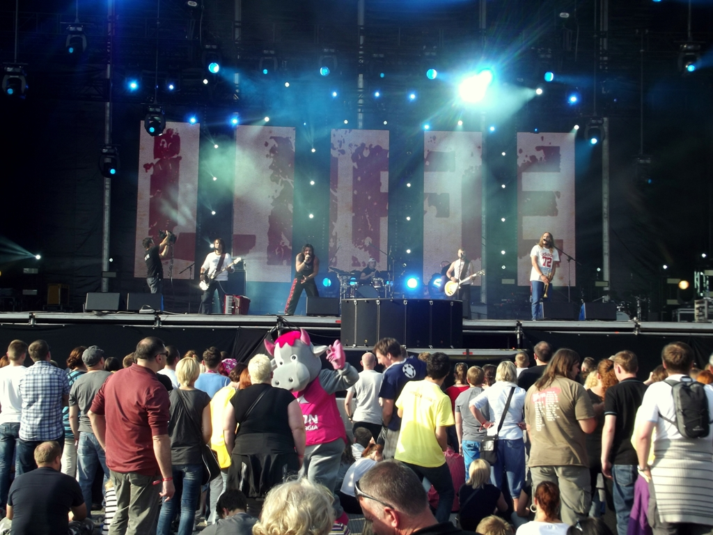 Zdjęcie zrobione podczas drugiego dnia Life Festivalu 2013 w Oświęcimiu.